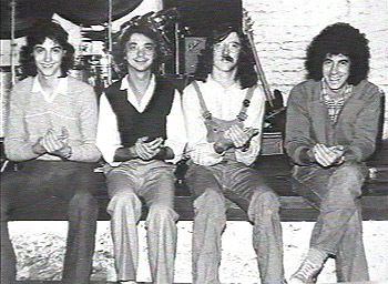 La agrupacion en 1978